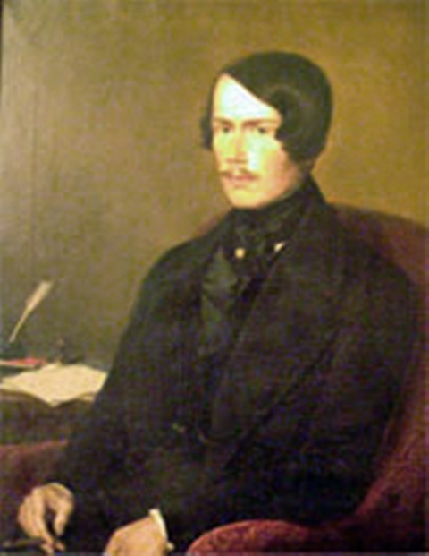 Hermann Fürst zu Wied (1814-1864) Sonstiges: ...